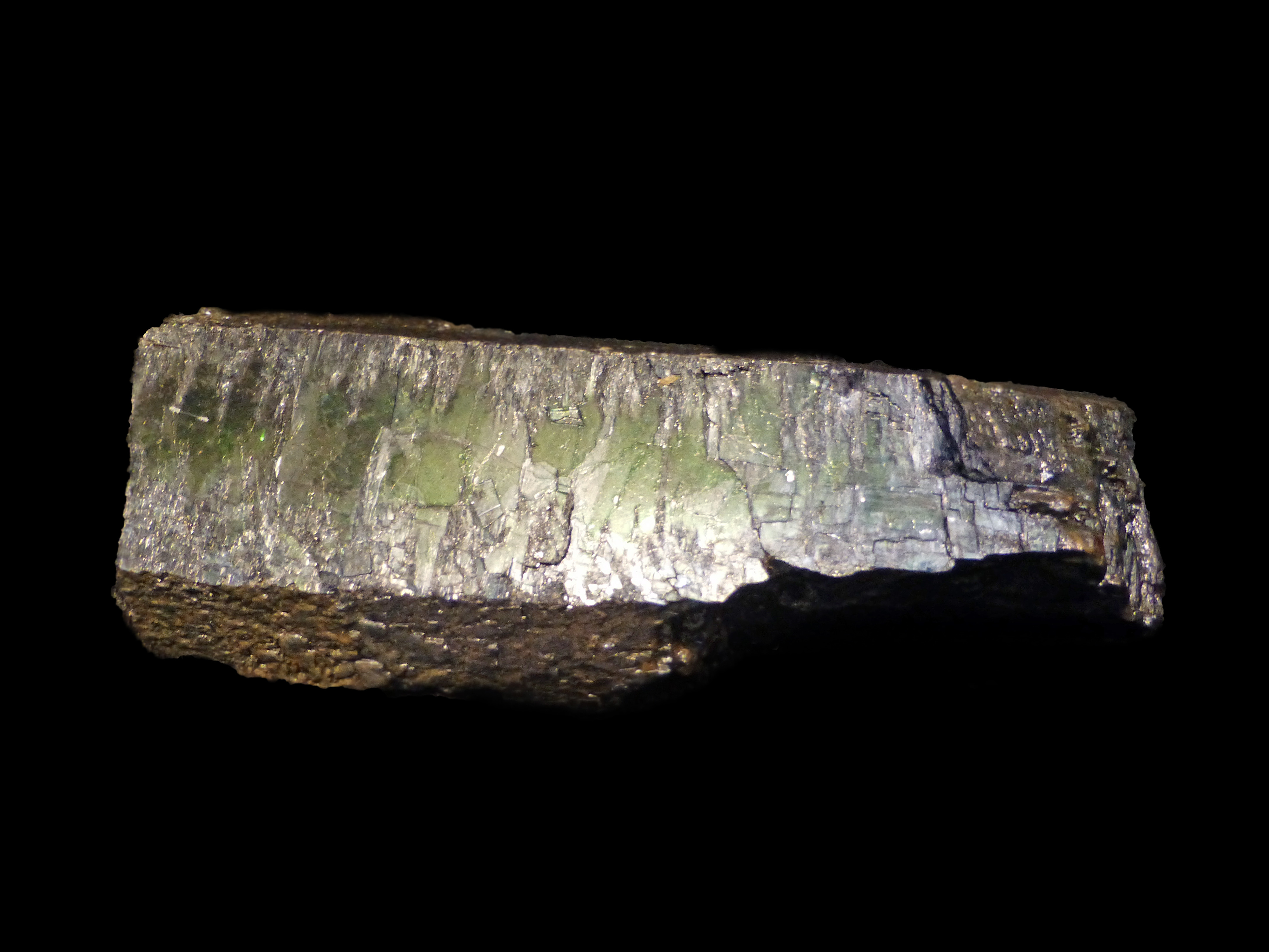 Vivianite (Anloua, Cameroun). Musée minéralogique de Strasbourg